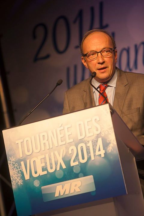 Jean-Paul Wahl aux voeux du MR Brabant wallon, le 11 janvier 2014